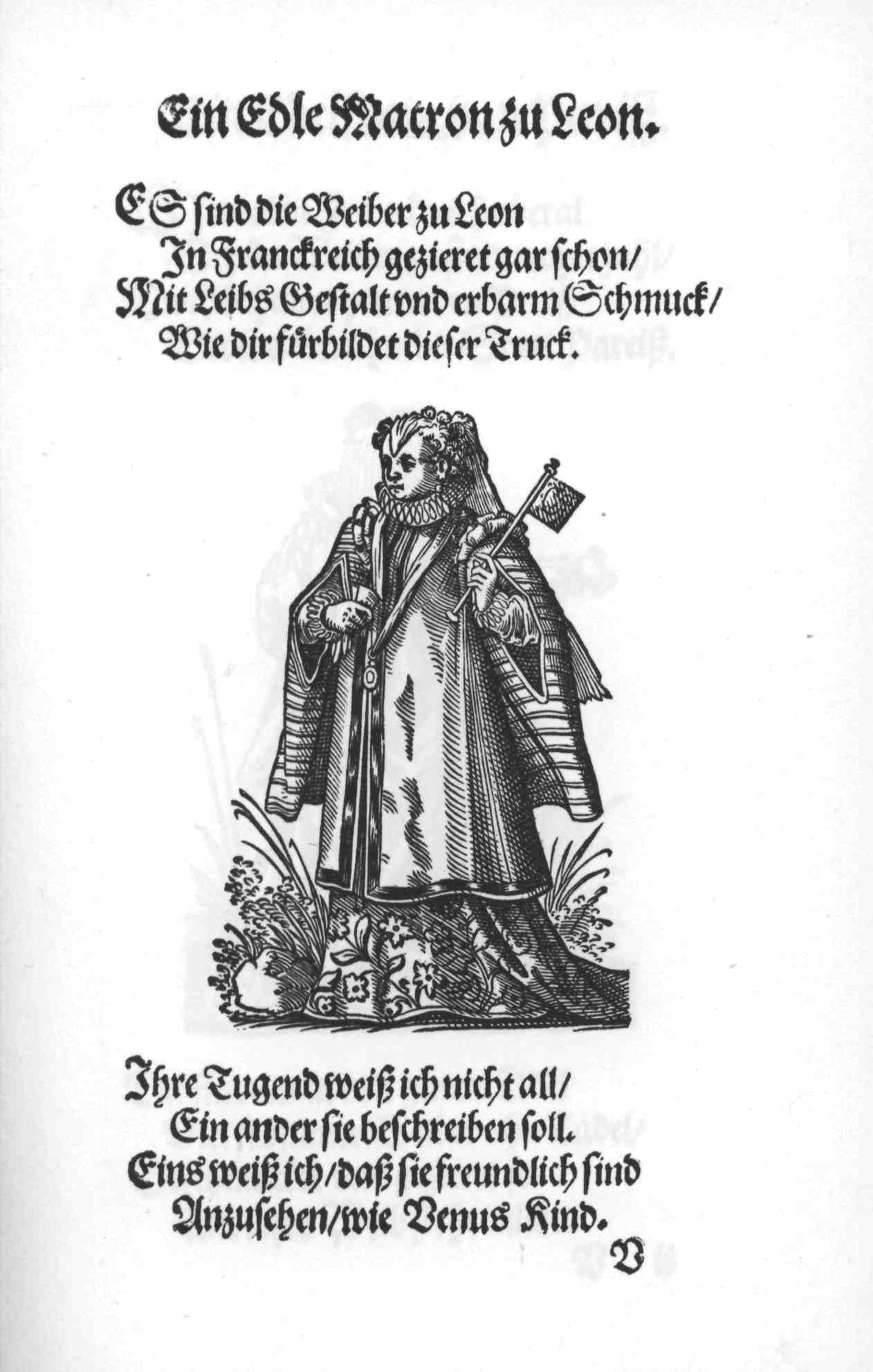 Ein Edle Matron zu Leon. Page from: Im Frauwenzimmer Wirt vermeldt von allerley schönen Kleidungen vnnd Trachten der Weiber (= Frauen-Trachtenbuch), Getruckt zu Franckfurt am Mayn in Verlegung Sigmund Feyrabends, 1586